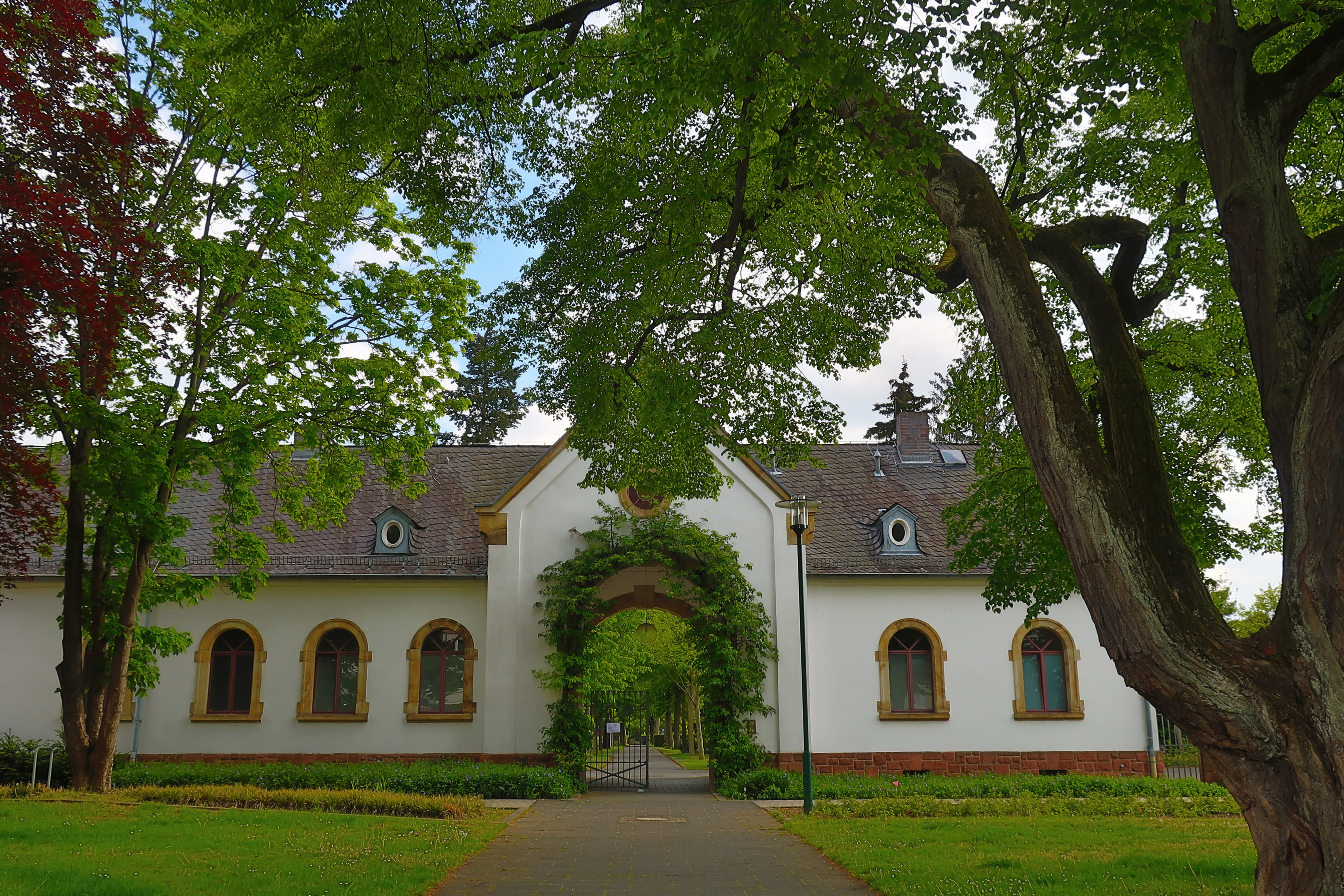 Eberstädter Friedhof Eingang mit Bogentor